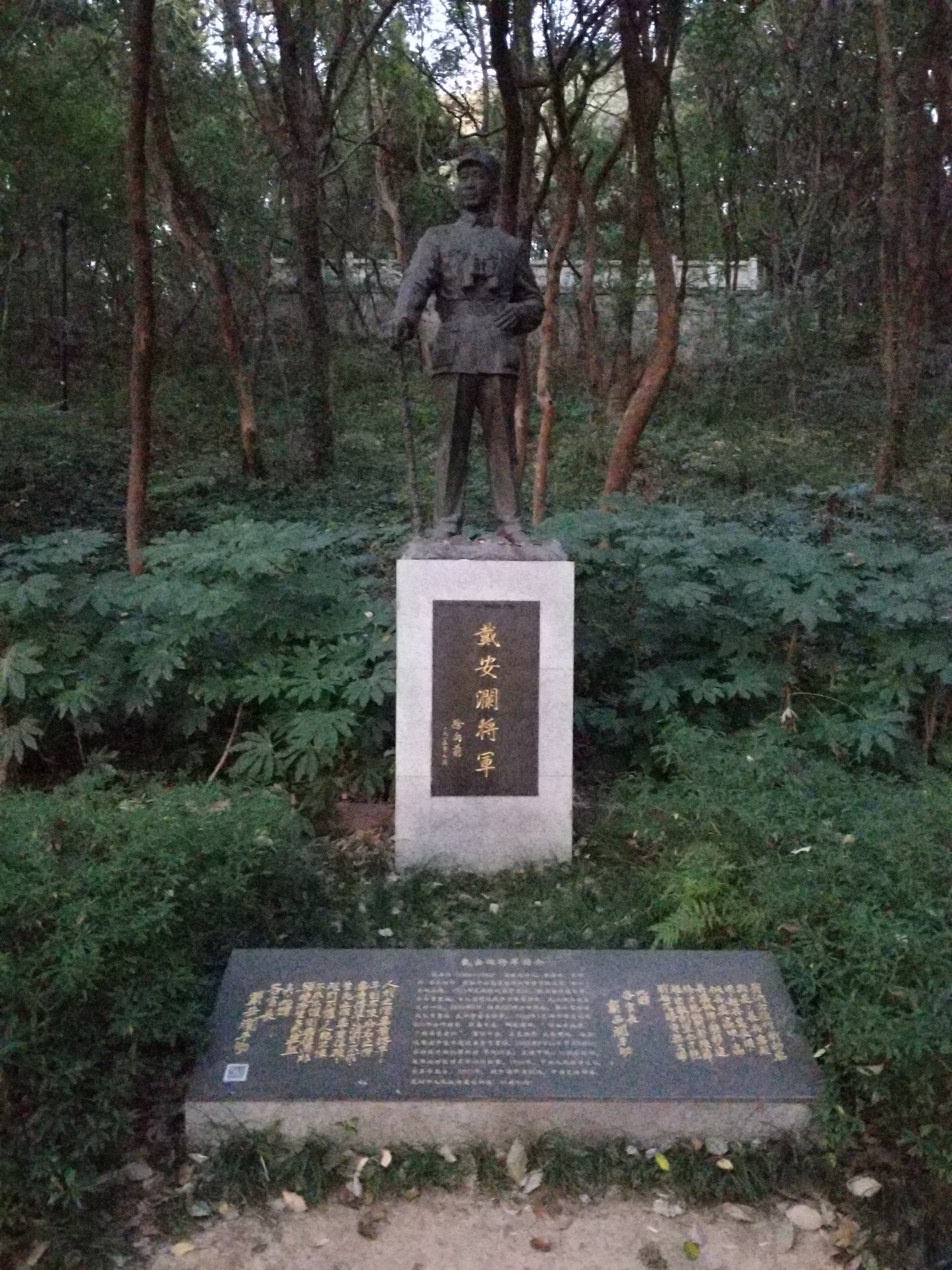 中文（中国大陆）: 戴安澜将军像